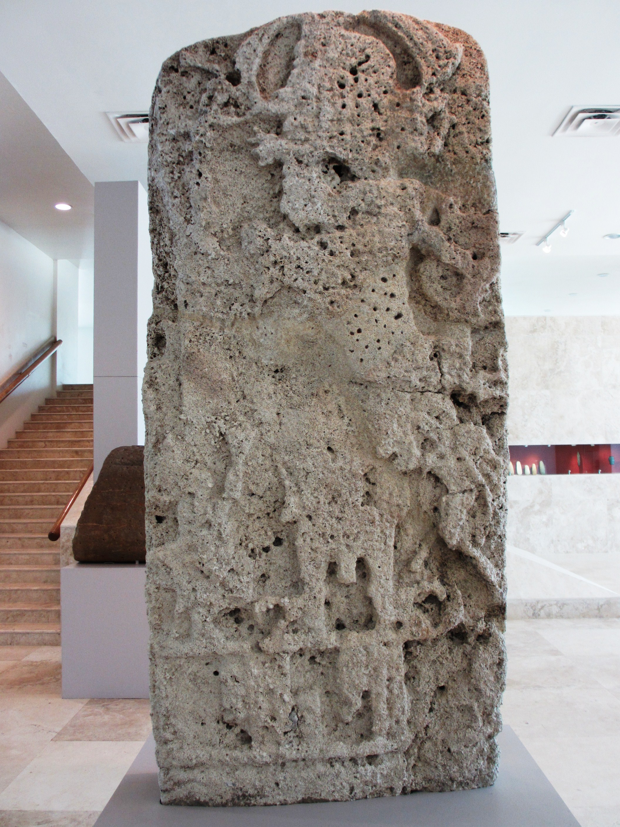 Estela 2 de la zona arqueológica de Moral Reforma, Balancán. Actualmente localizada en el Museo Regional de Antropología "Carlos Pellicer Cámara" en la ciudad de Villahermosa, Tabasco, México.